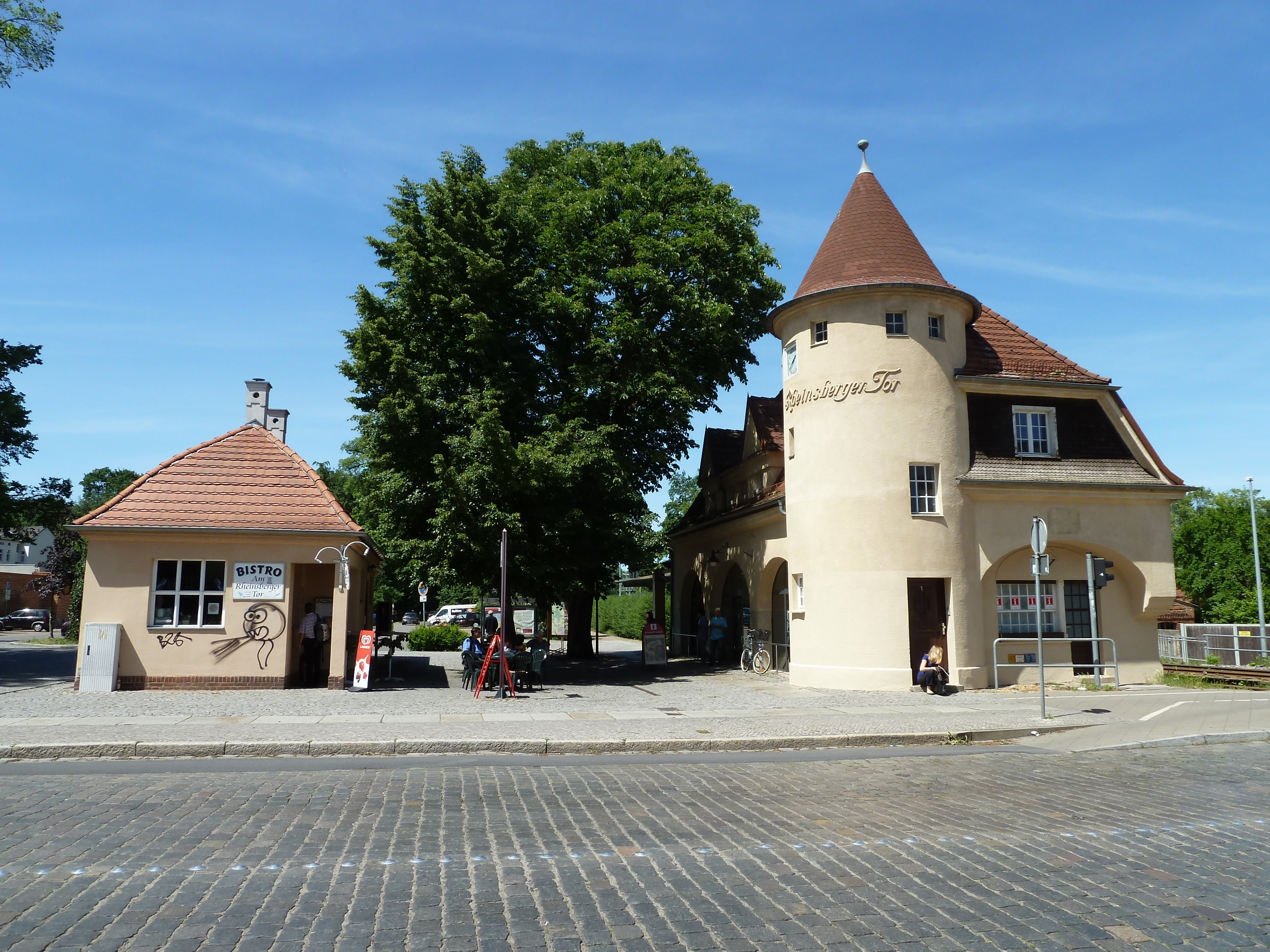 Haltepunkt Neuruppin Rheinsberger Tor